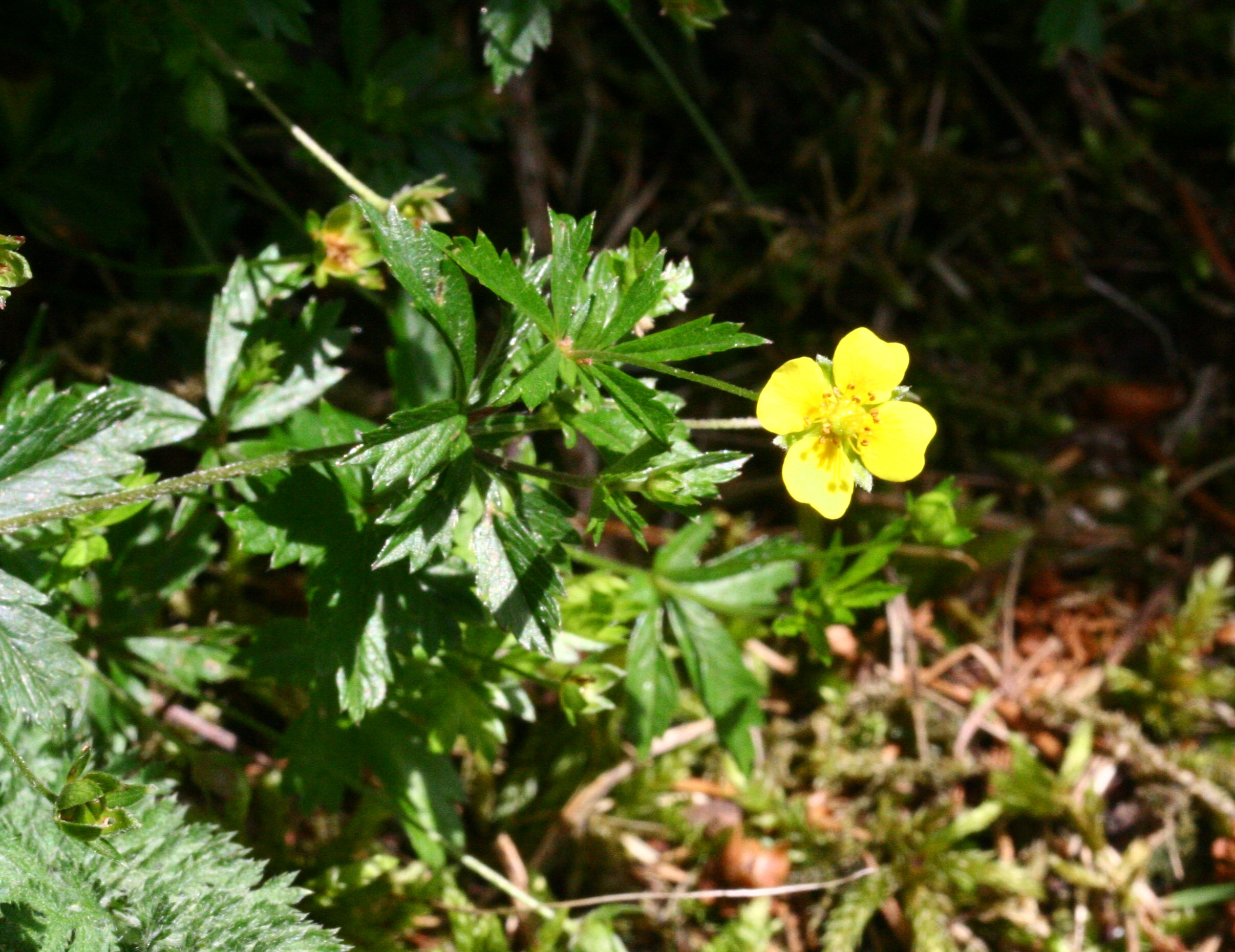 Potentilla_erecta (Cinquefoglia tormentilla) Giardino Botanico Alpino "Giangio Lorenzoni" (loc. Pian Cansiglio), Tambre d'Alpago (BL), quota 1000 m s.l.m.